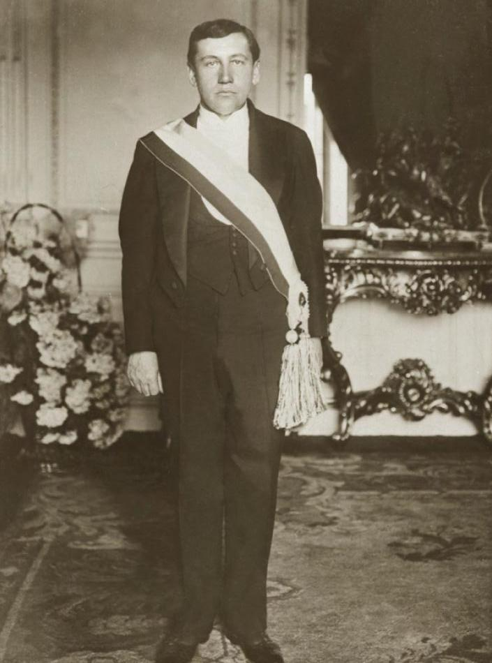 Fotografía de Arturo Alessandri Palma, Presidente de Chile (1920-1925; 1932-1938), en el Palacio de La Moneda, luego de haber asumido el cargo en 1920.